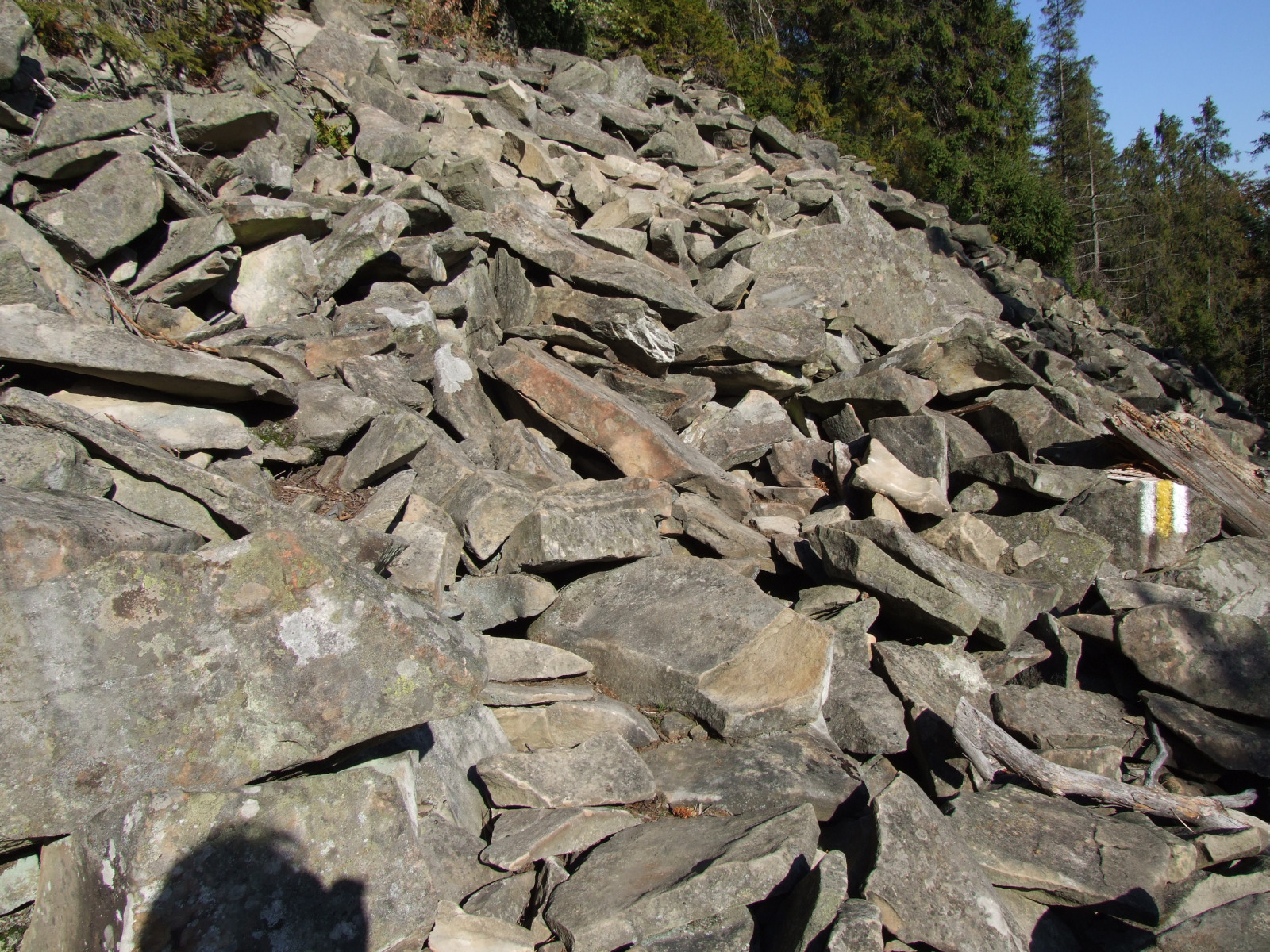 Nature reserve Luboń Wielki (Beskid Wyspowy)